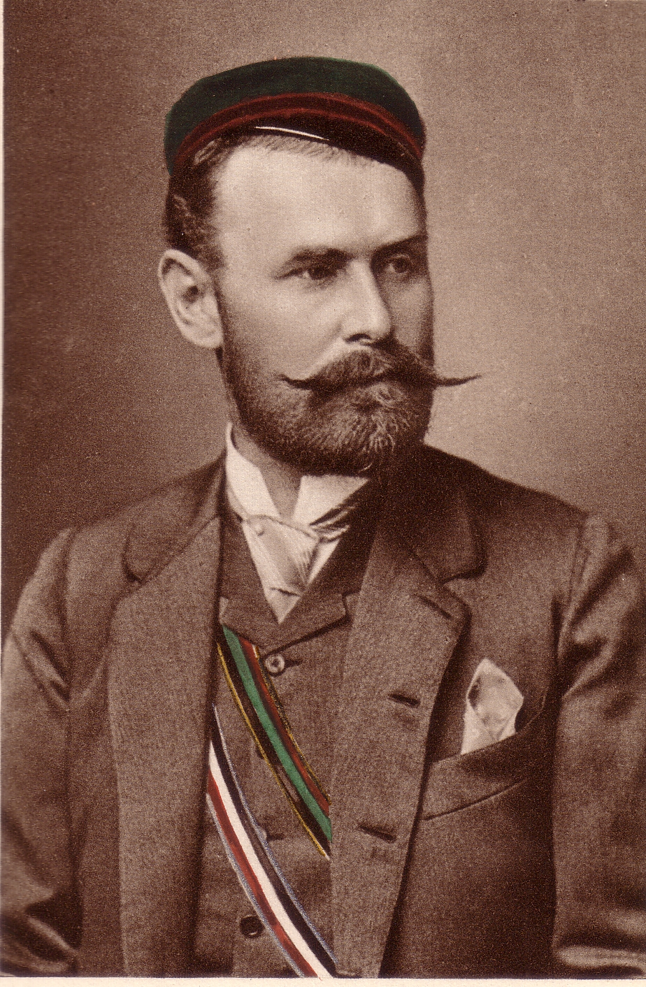 König Wilhelm II. von Württemberg in den Farben der Corps Bremensia Göttingen und Suevia Tübingen